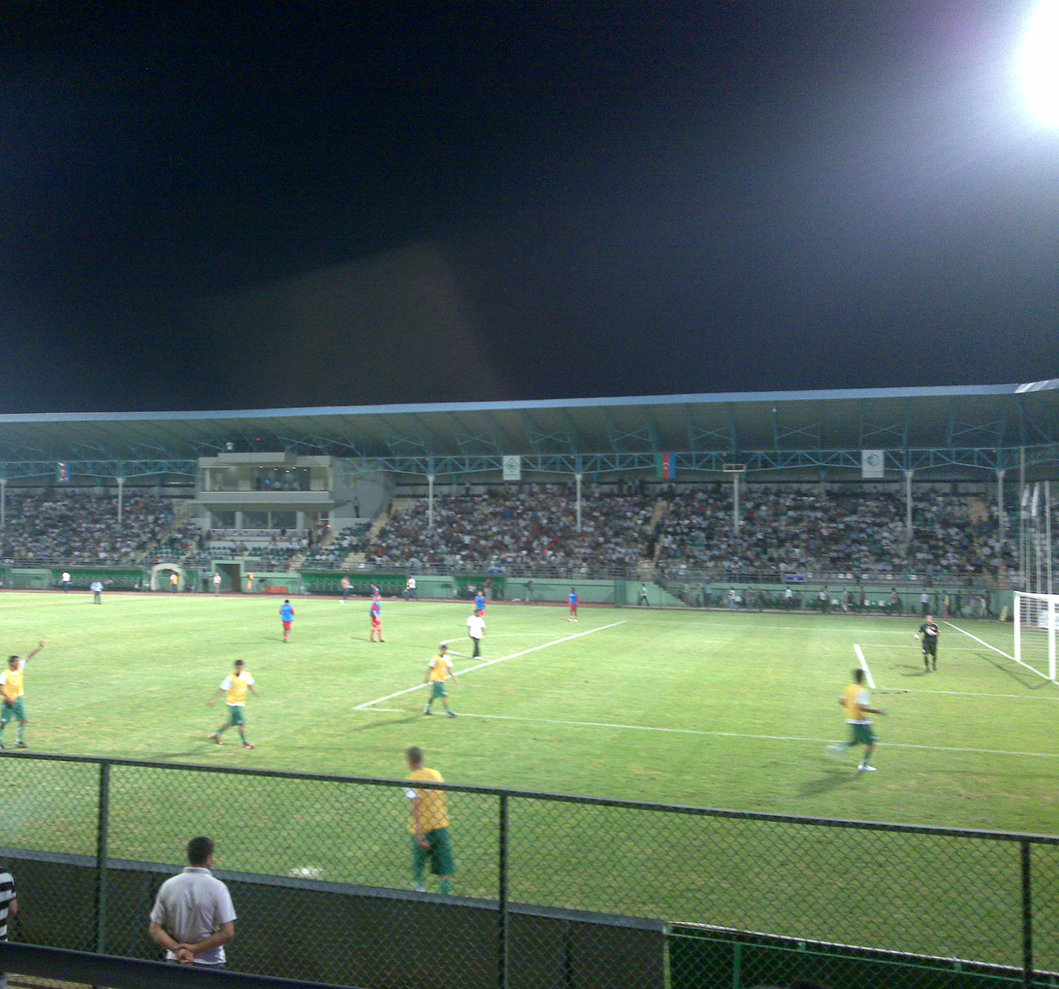 8 iyul 2010-cu il. "Xəzər Lənkəran" tarixində ilk dəfə Avropa arenasındakı qarşılaşmanı öz doğma stadionunda "Olimpiya" (Moldova) klubuna qarşı keçirdi. Lənkəran şəhər stadionu adəti üzrə 15 min azarkeş ilə dolu idi.